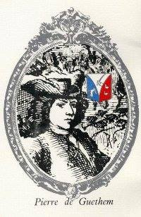 Pierre de Guethem est un militaire français né en 1659 à Tourcoing et mort dans la même ville en 1709